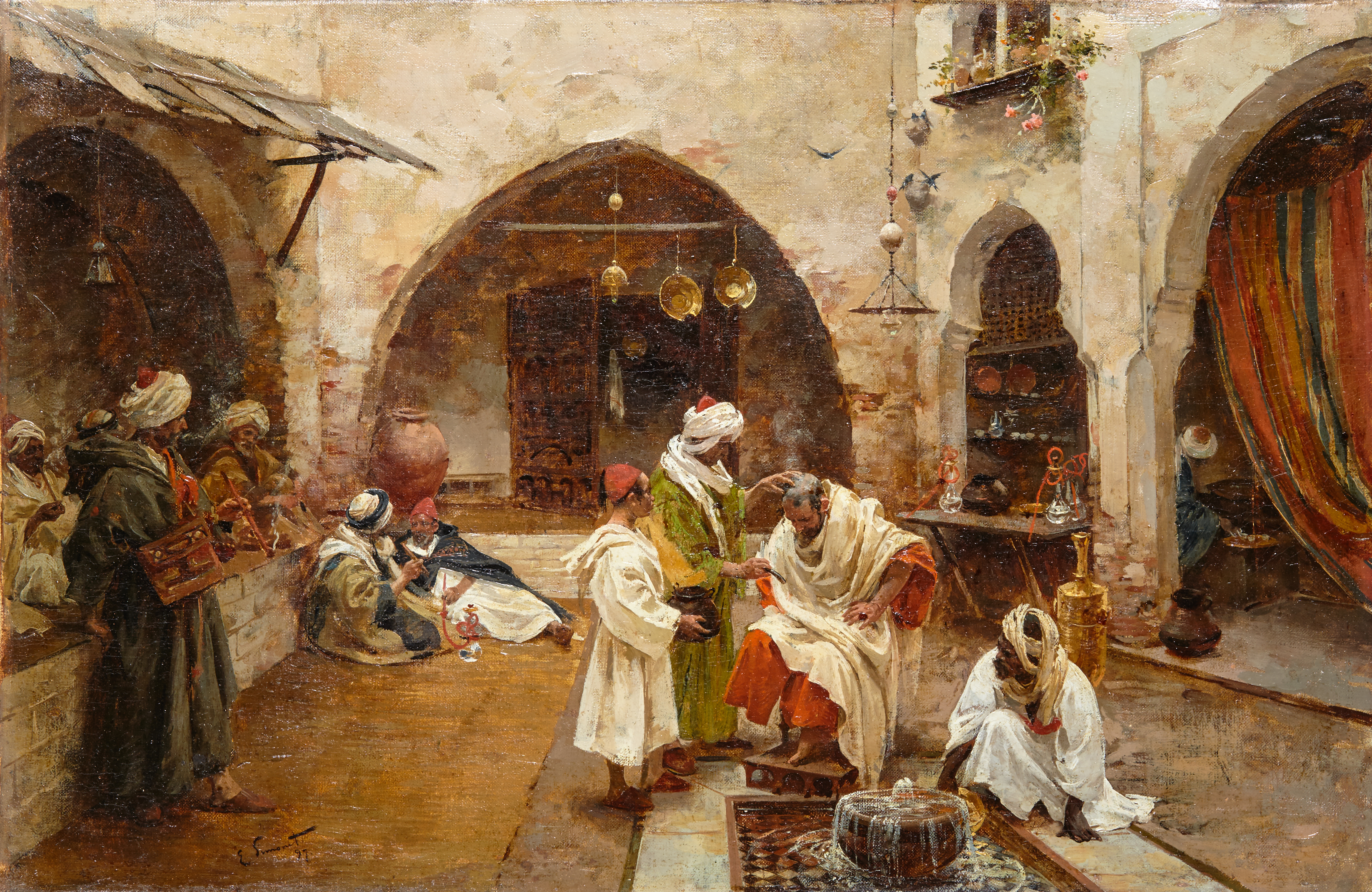 Descripción en español